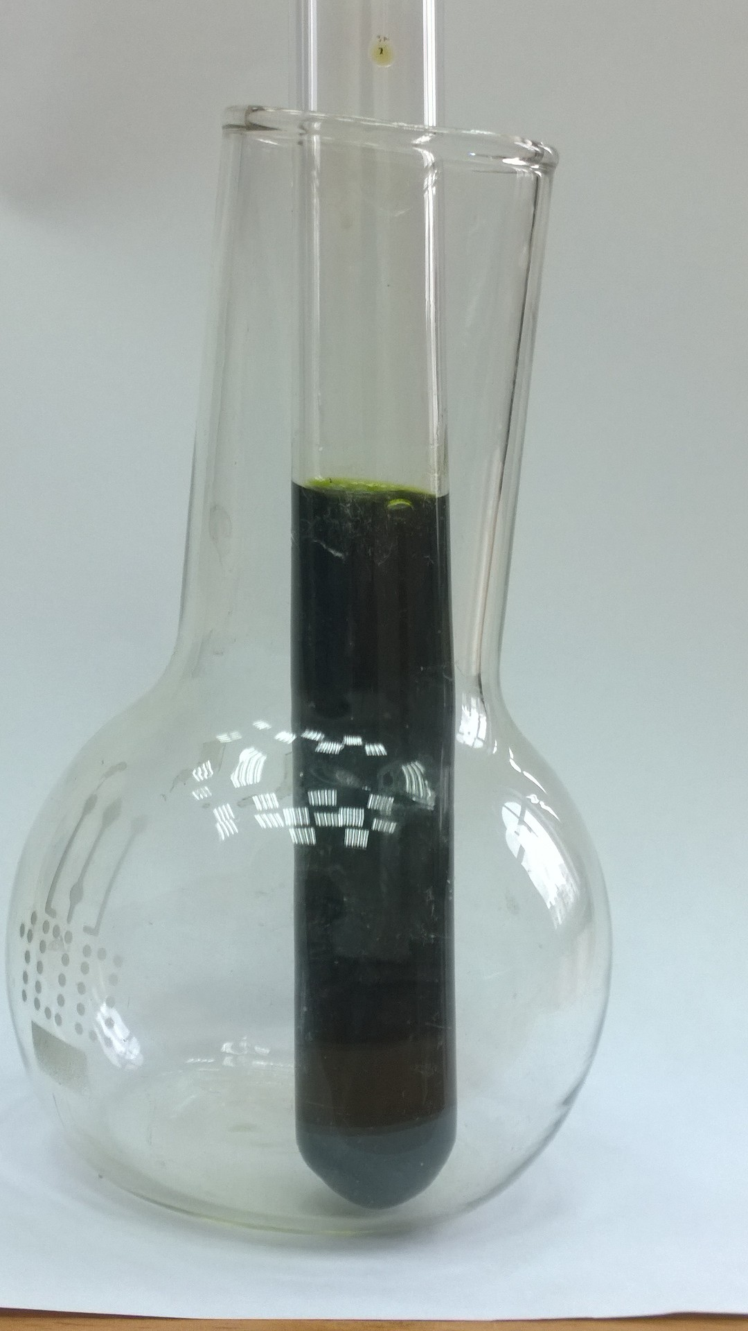 Раствор в серной кислоте.